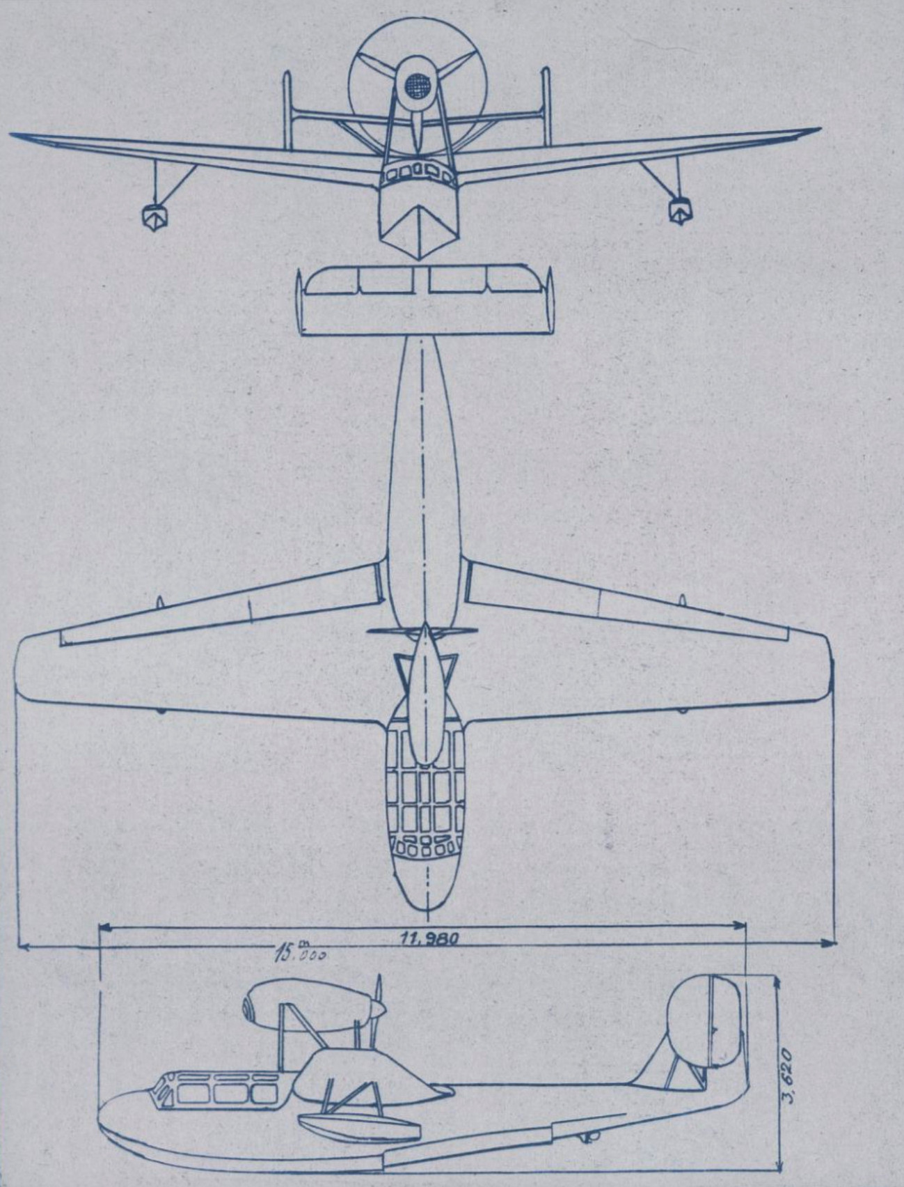 Extrait de la revue : "Title : Décollage : le magazine de l'aviation mondiale Publisher : [s.n.] (Paris) Publication date : 1946-09-06 Type : text Type : printed serial Language : french Language : français Description : 06 septembre 1946 Description : 1946/09/06 (N25). Rights : public domain Identifier : ark:/12148/bpt6k9767029t Source : Musée Air France, 2017-1795 Relationship : Relationship : Provenance : Bibliothèque nationale de France Date of online availability : 06/03/2017 "